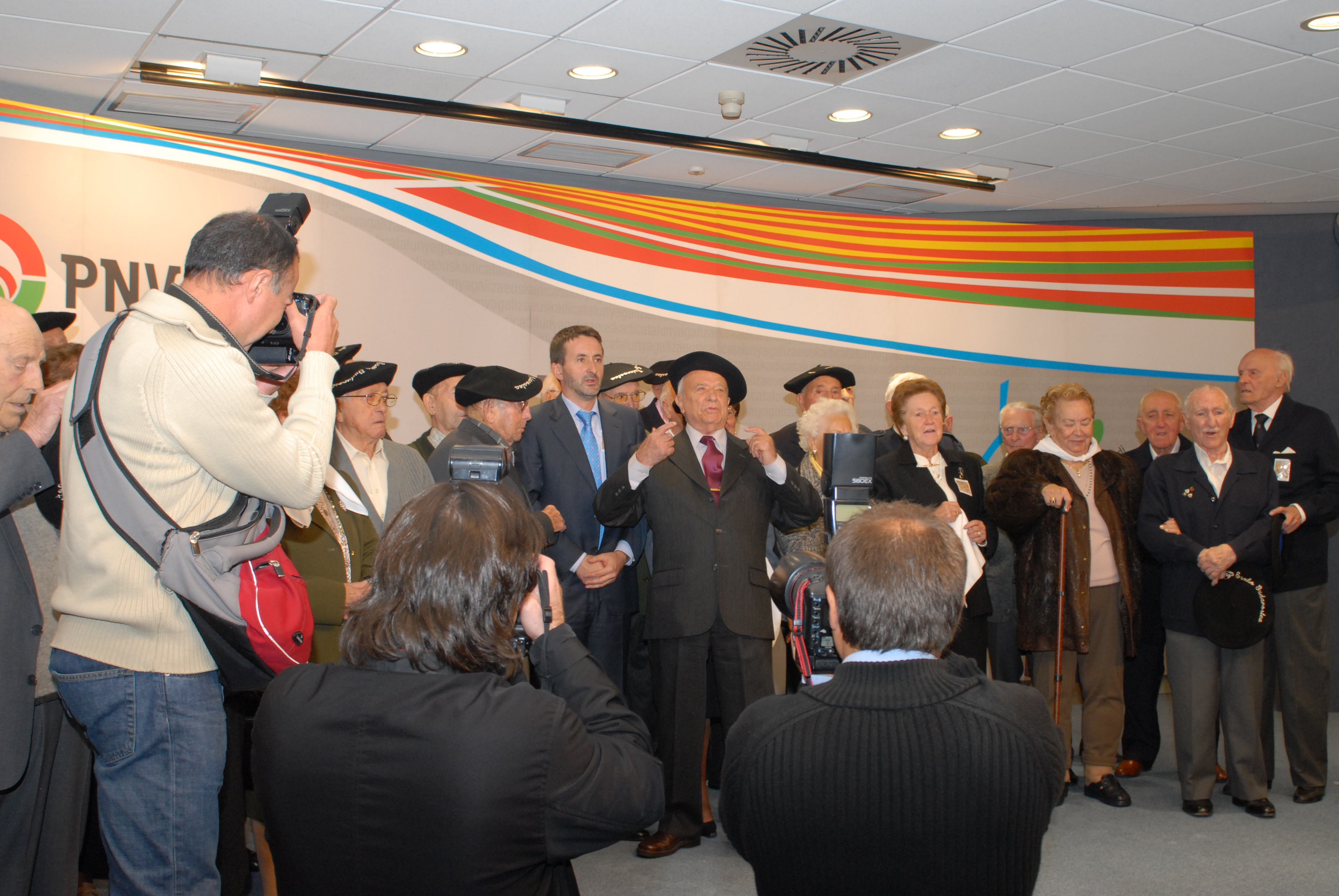 Josu Jon Imaz en el "Gudari Eguna" del Partido Nacionalista Vasco de 2007. Es el acto celebrado anualmente en el que se homenajea a los combatientes del Euzko Gudarostea, ejército del Gobierno Vasco en la Guerra Civil.